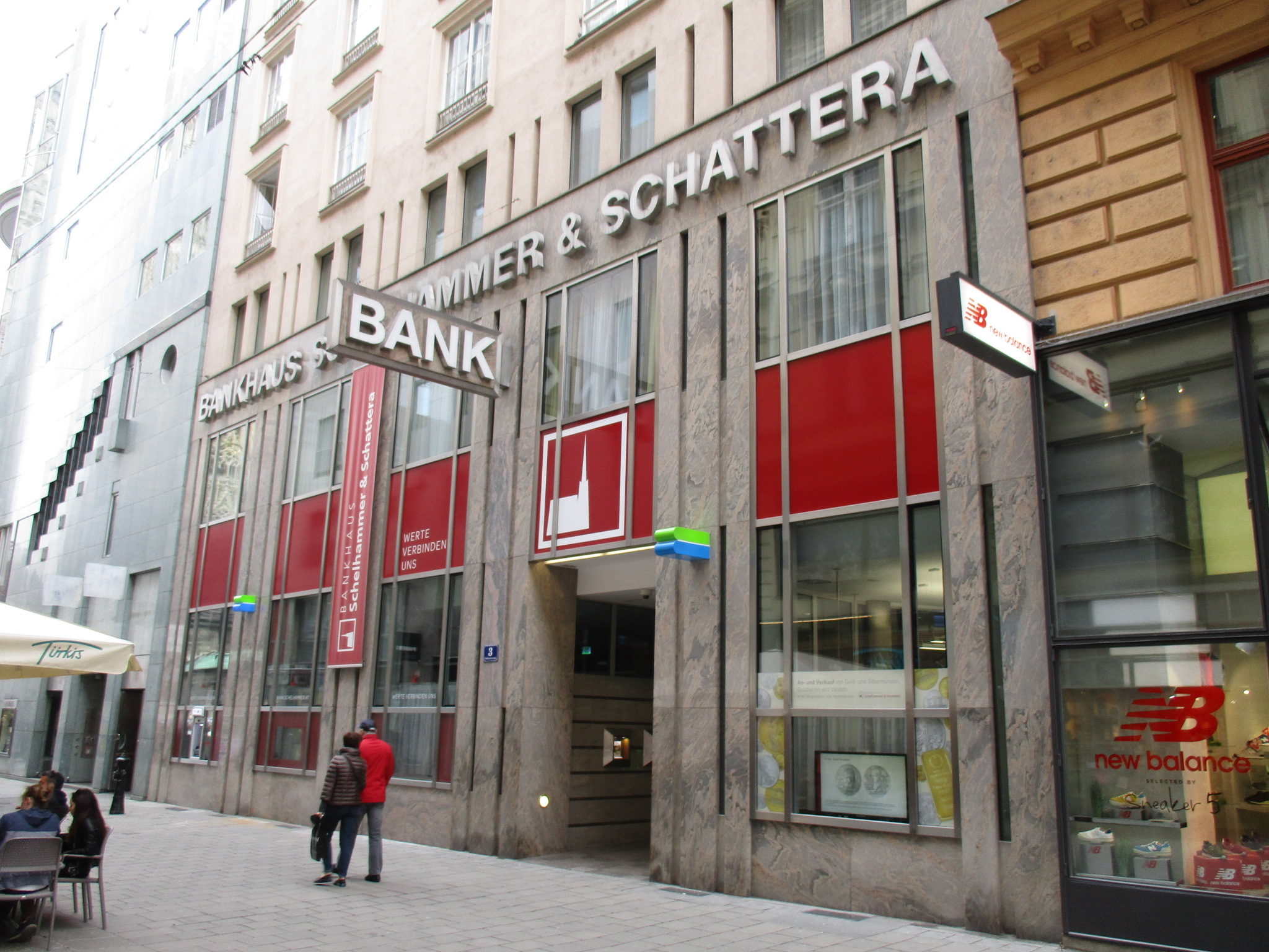 Fassade und Eingang des Bankhauses Schelhammer & Schattera in der Goldschmiedgasse 3 in 1010 Wien